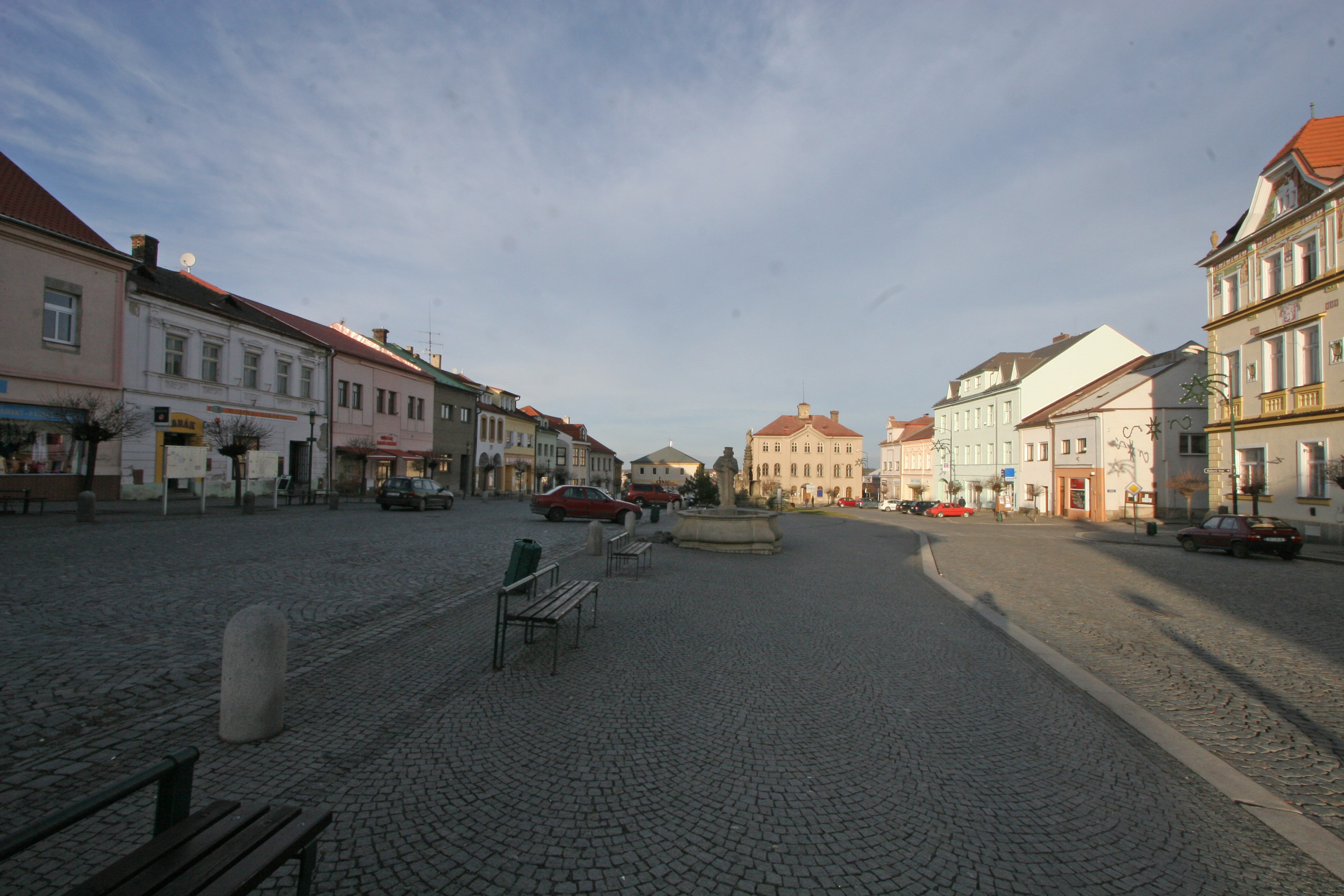 Skuteč Palackého náměstí